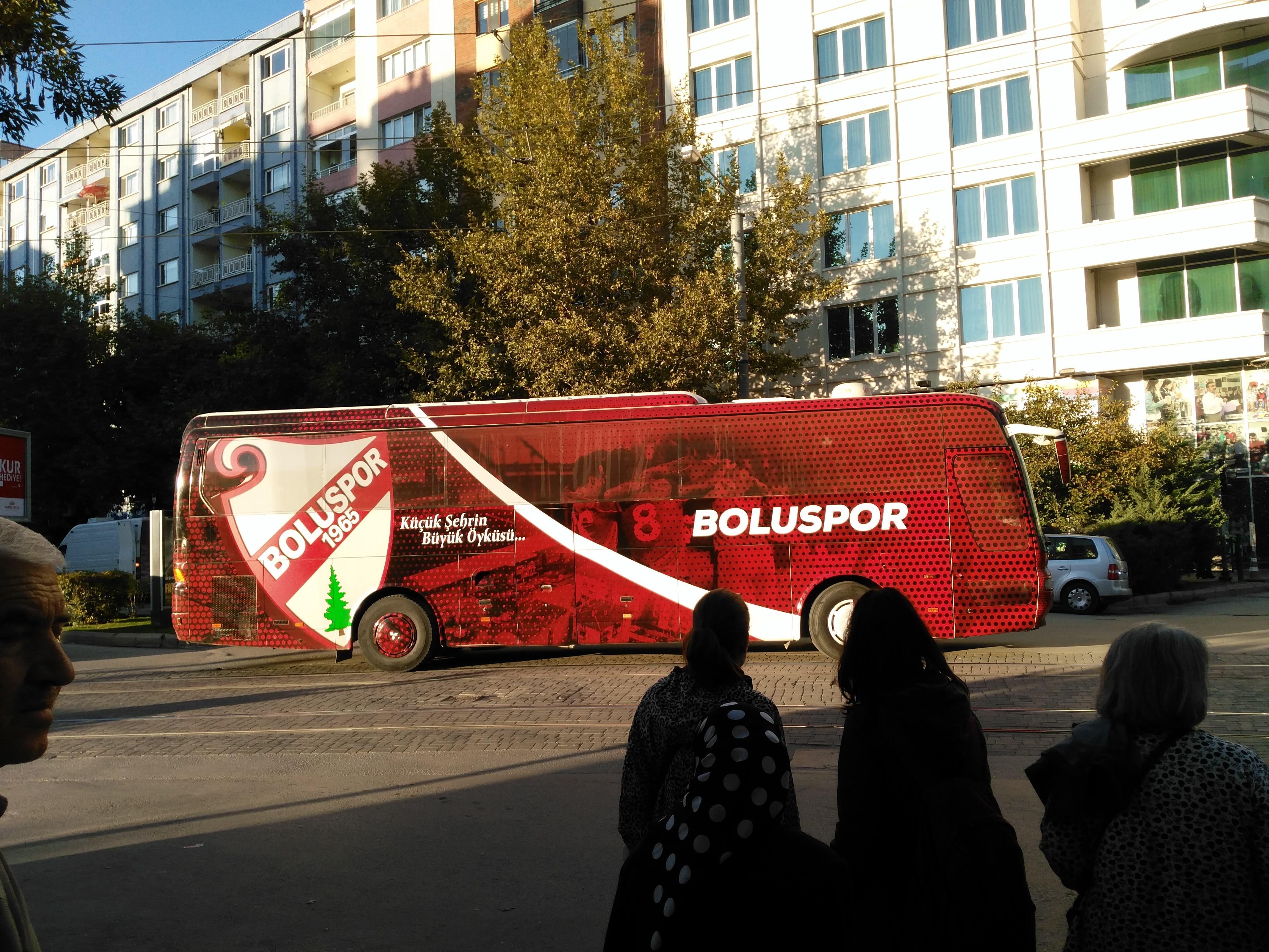 Booluspor aracı şehir merkezinde ilerlerken